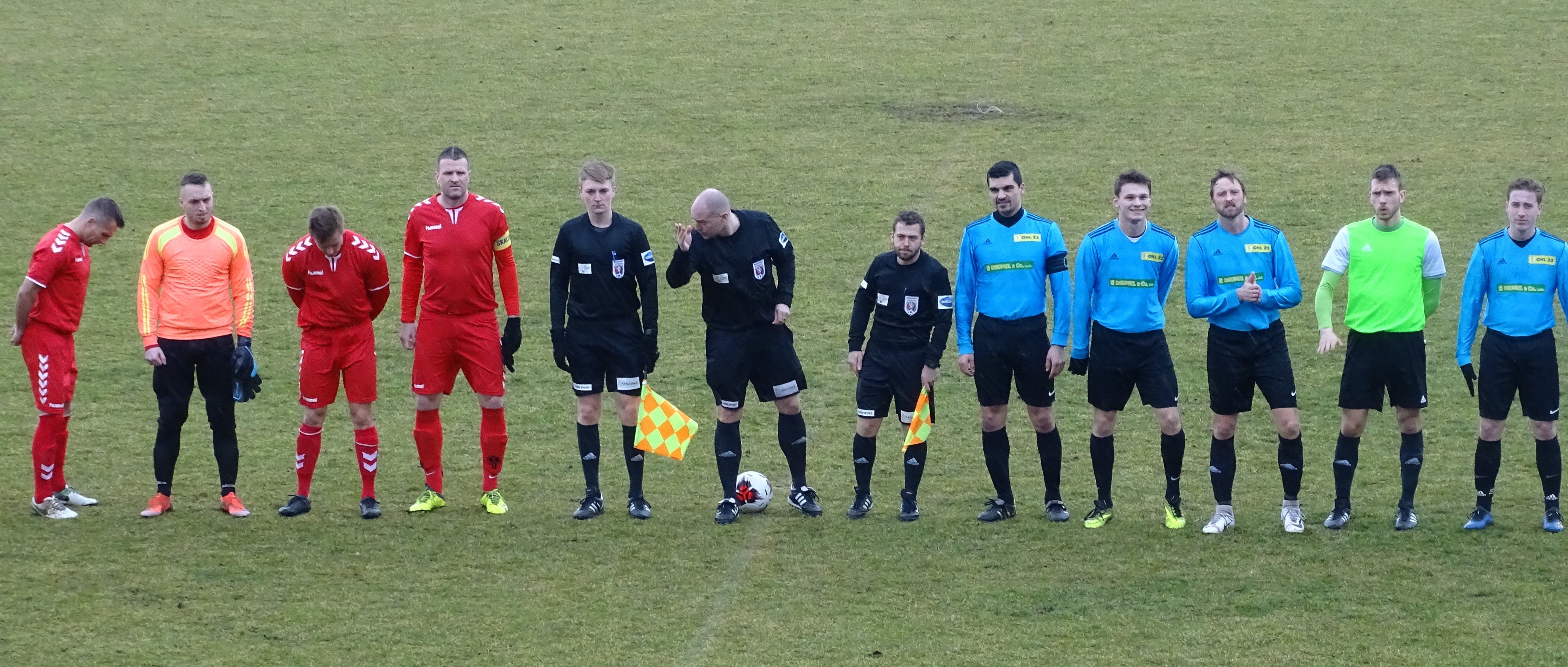 zápas